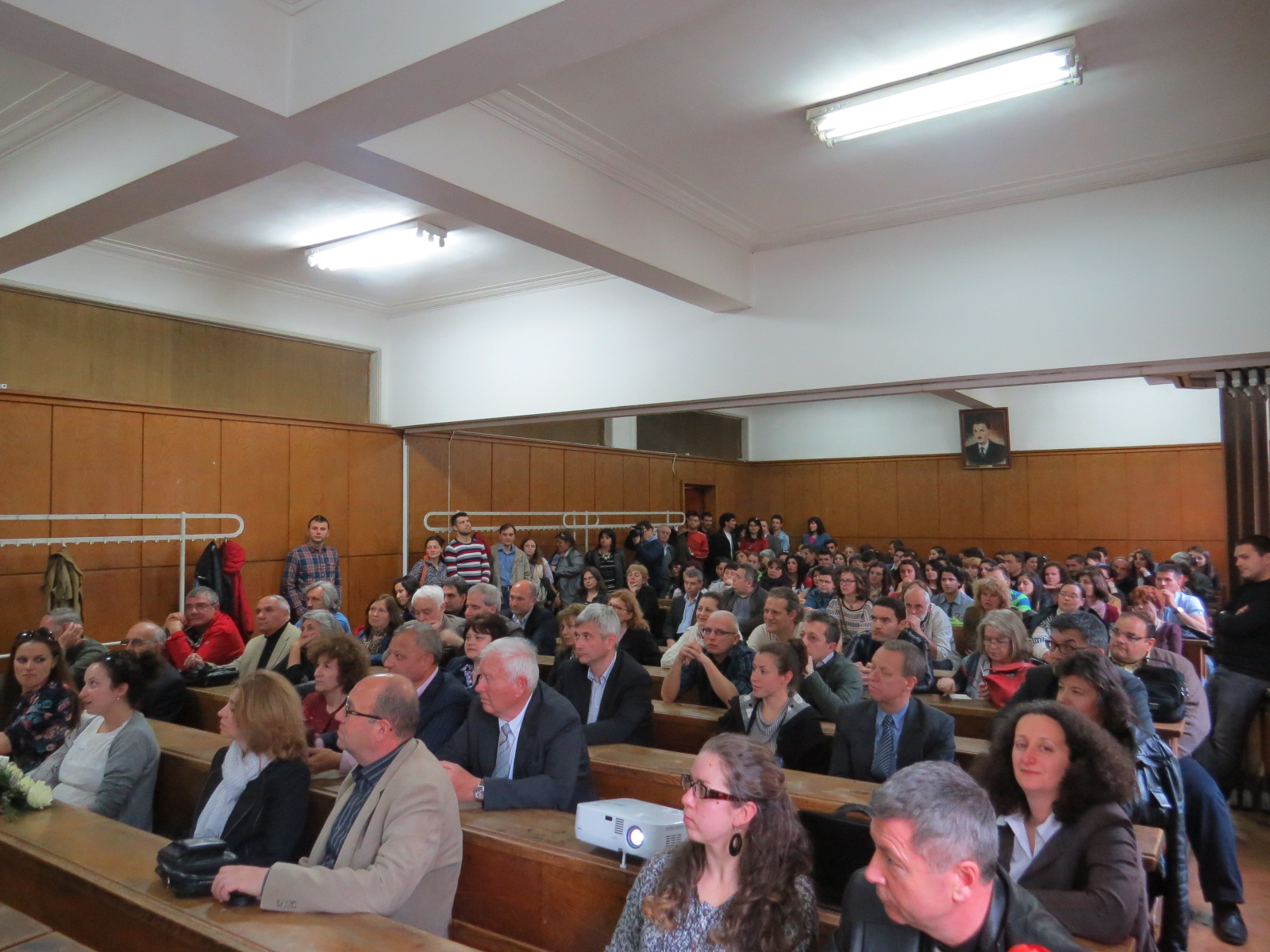 Честване на 40 години катедра ЛОПС, ГГФ, през 2013 г.